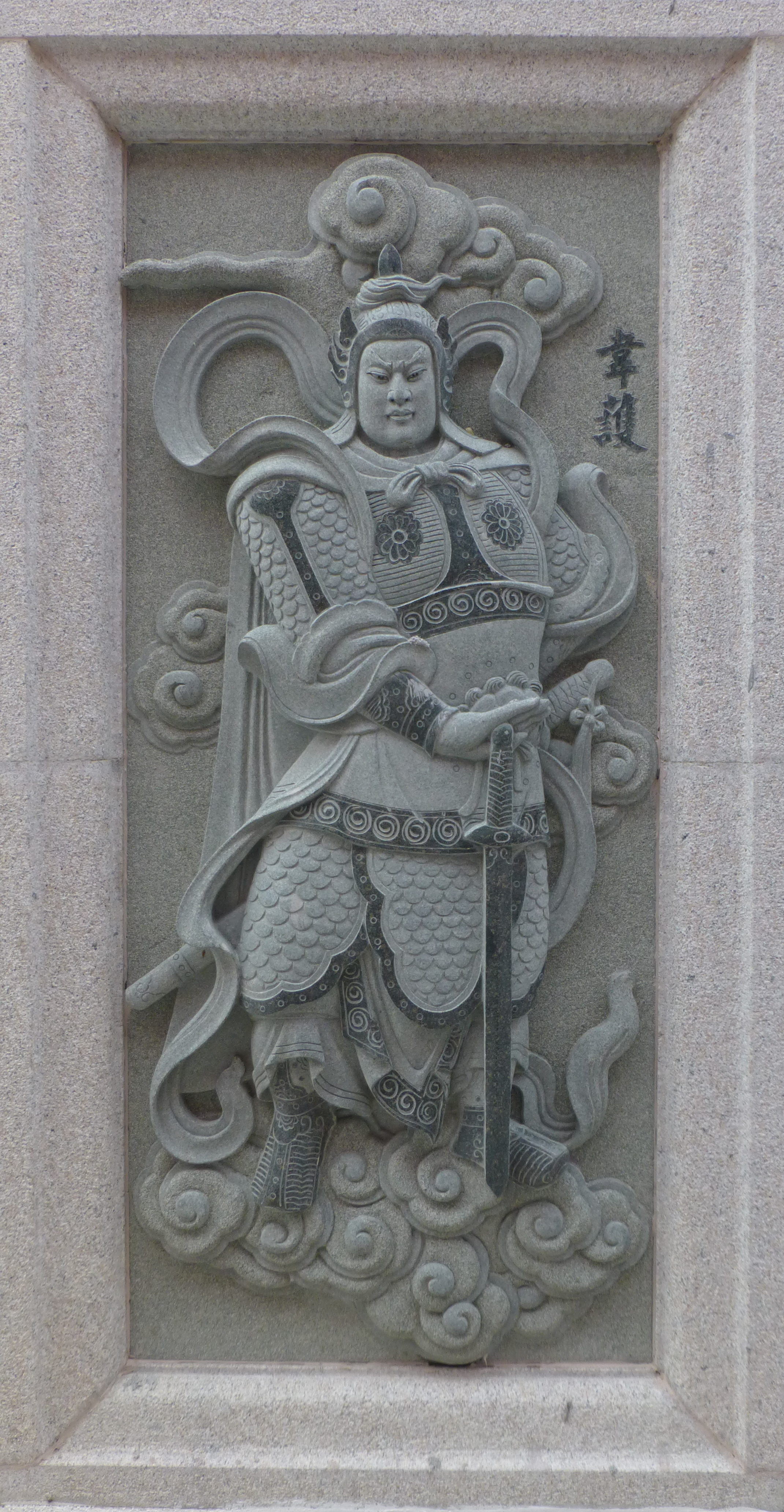 010 Wei hu (Skanda), Investiture of the Gods at Ping Sien Si, Pasir Panjang, Perak, Malaysia Photograph from the Ping Sien Si Temple in Perak, Malaysia taken by Anandajoti.